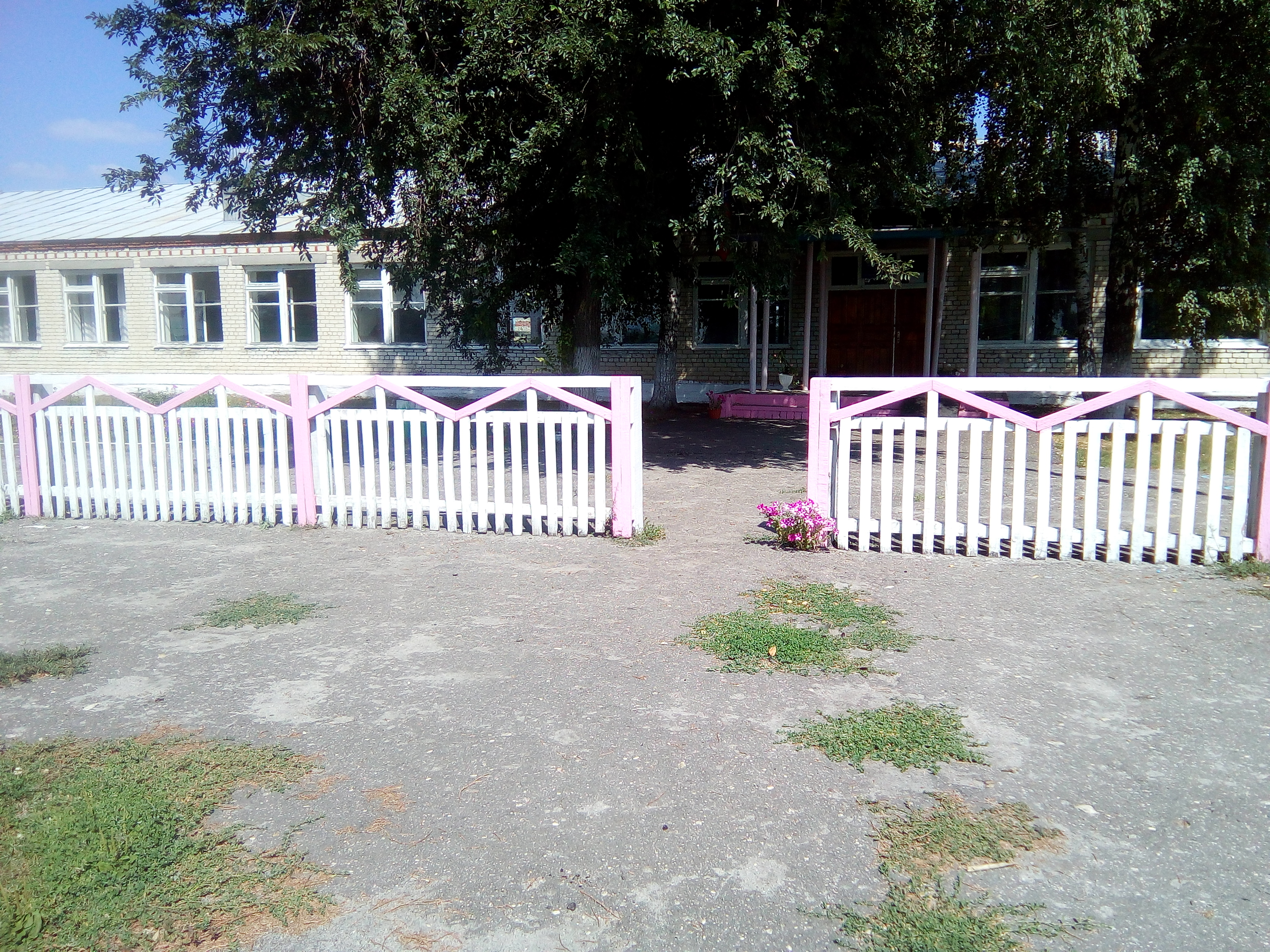 МБОУ ООШ села Топлое